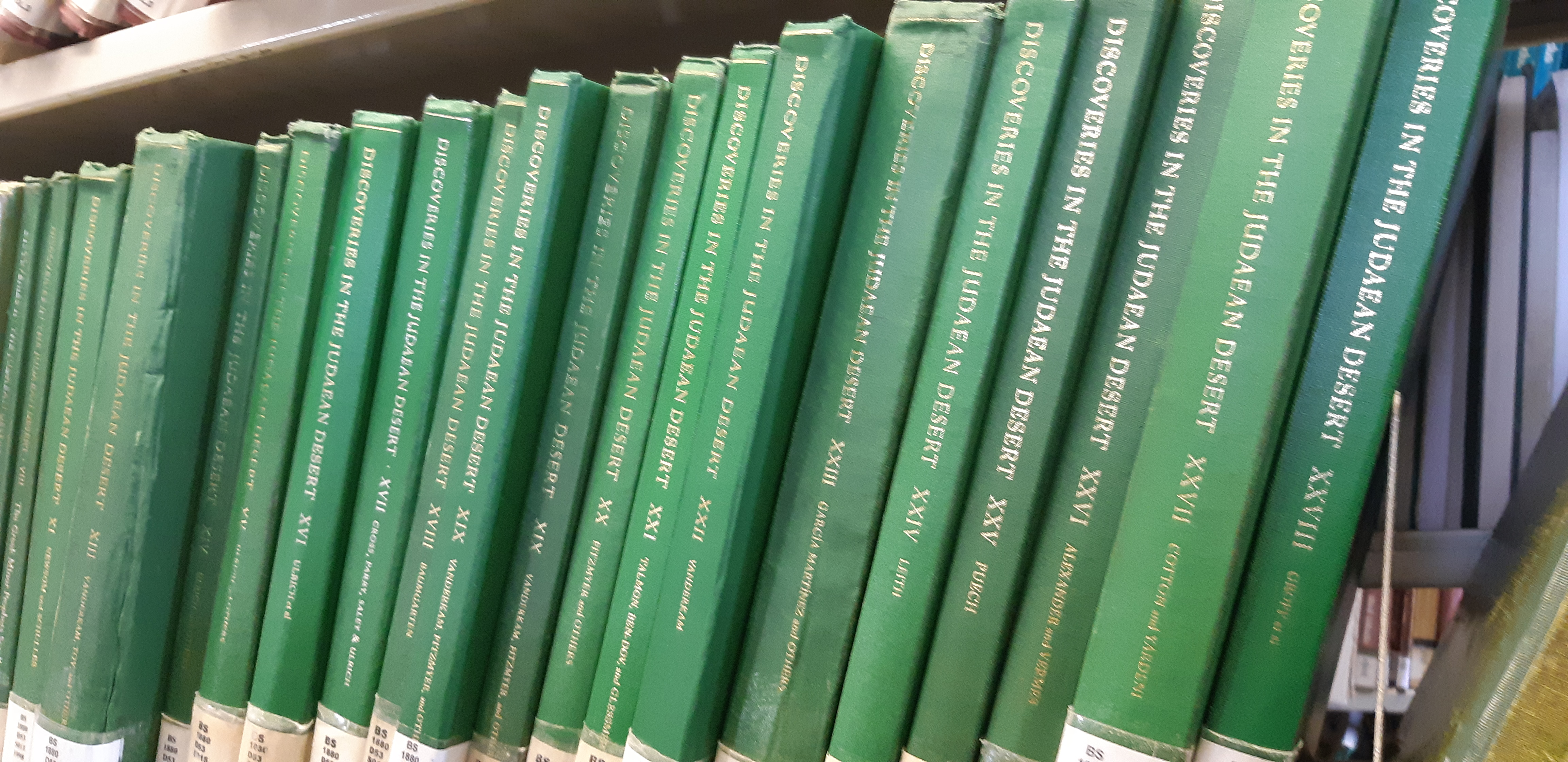 סדרת הספרים של מחקרי תגליות מדבר יהודה